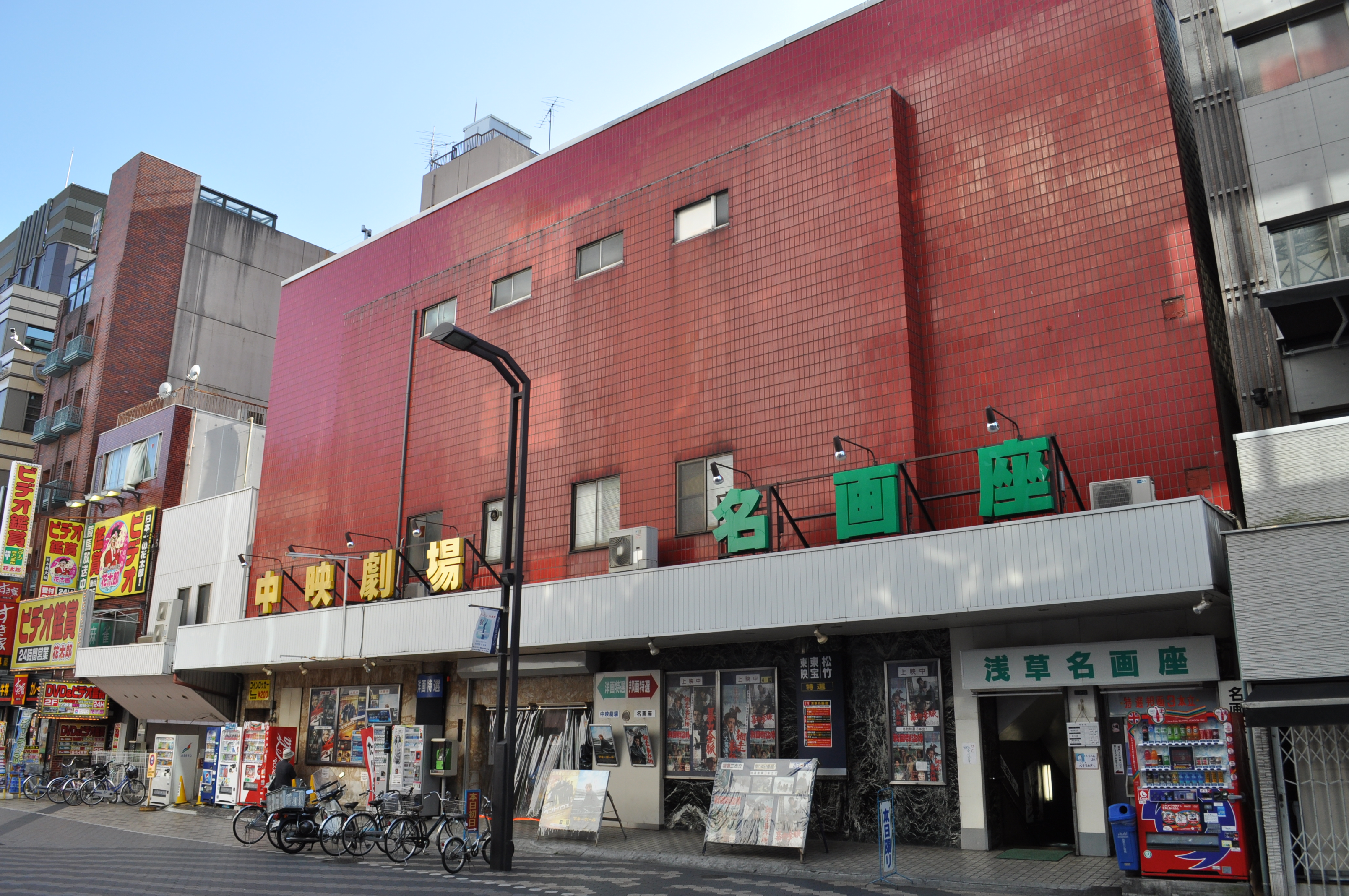 中央劇場名画座